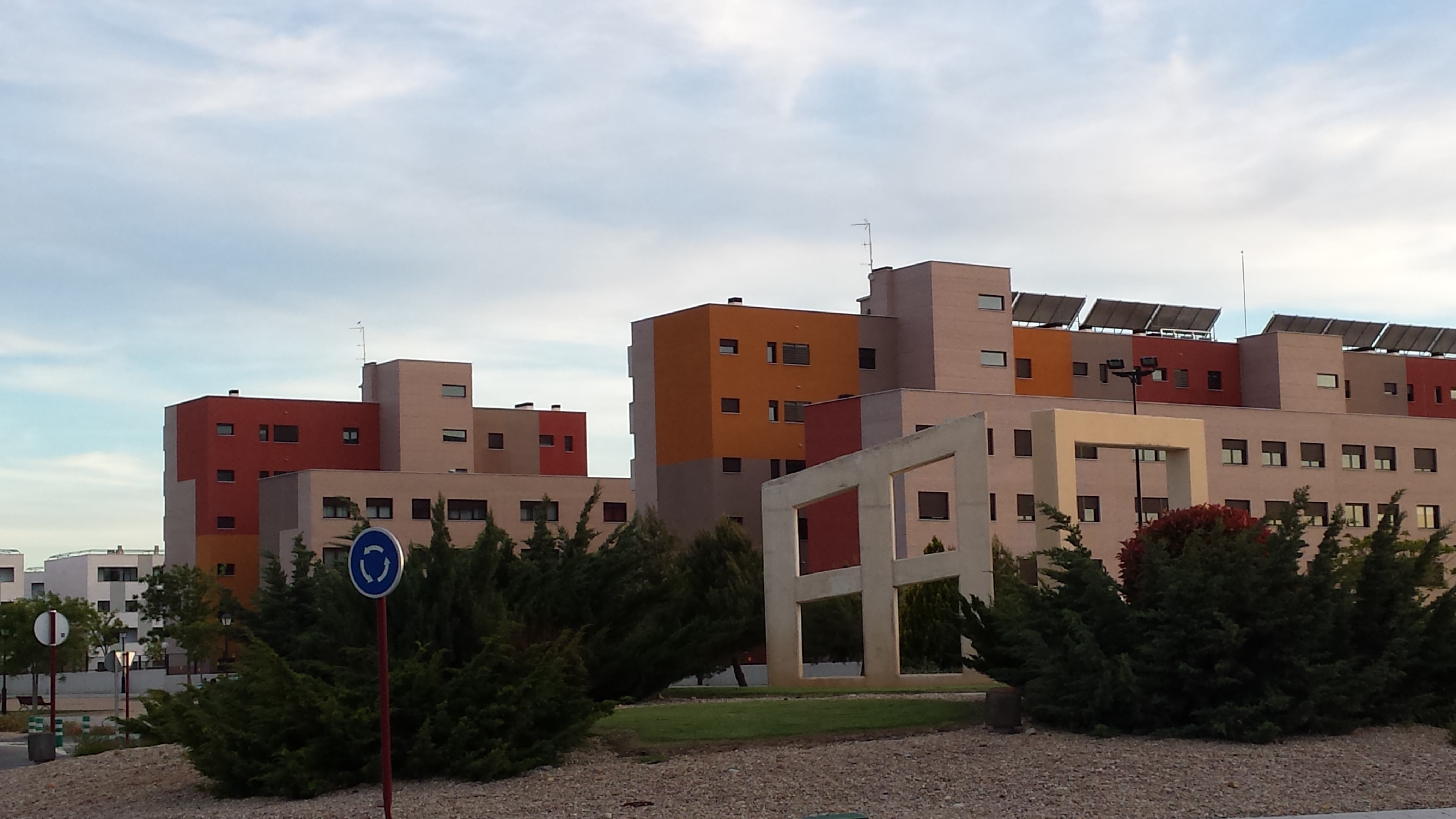 Barrio Hoya de San Ginés Albacete